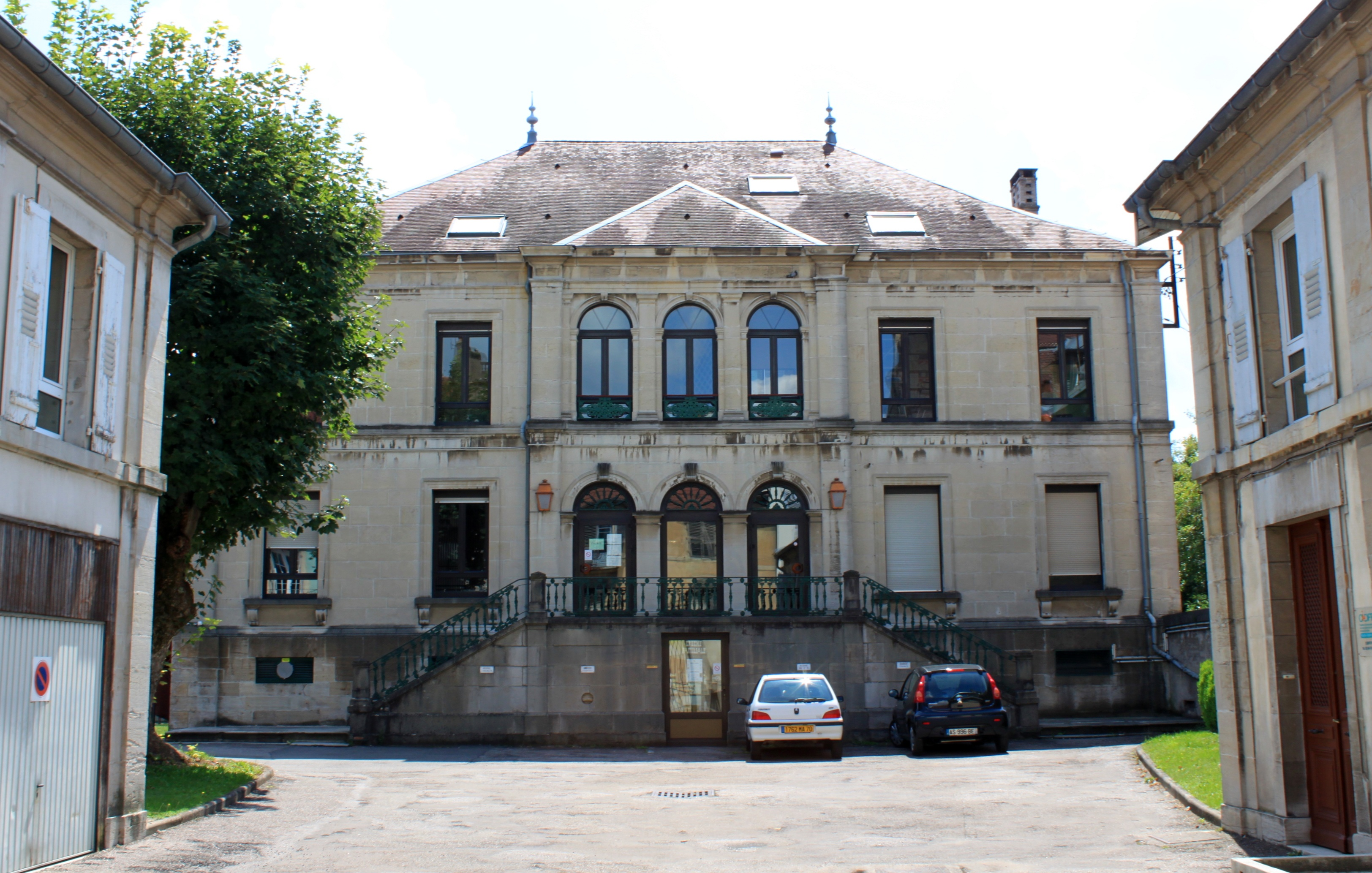 Vesoul, Haute-Saone, Franche-Comté, France